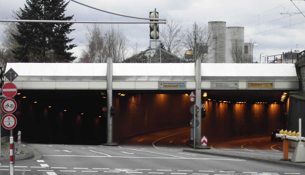 Das Nordportal des Bad Godesberger Tunnels in Bonn-Bad Godesberg. Links im Bild ist Ausfahrt der Röhre der B 9 in Fahrtrichtung Norden, in der Mitte eine Unterführung unter der Bahnstrecke, die auf die alte B 9 führt, rechts die Einfahrt zur Röhre, die die B 9 nach Süden führt. Im Hintergrund sind die Türme der Belüftungsanlage zu erkennen.